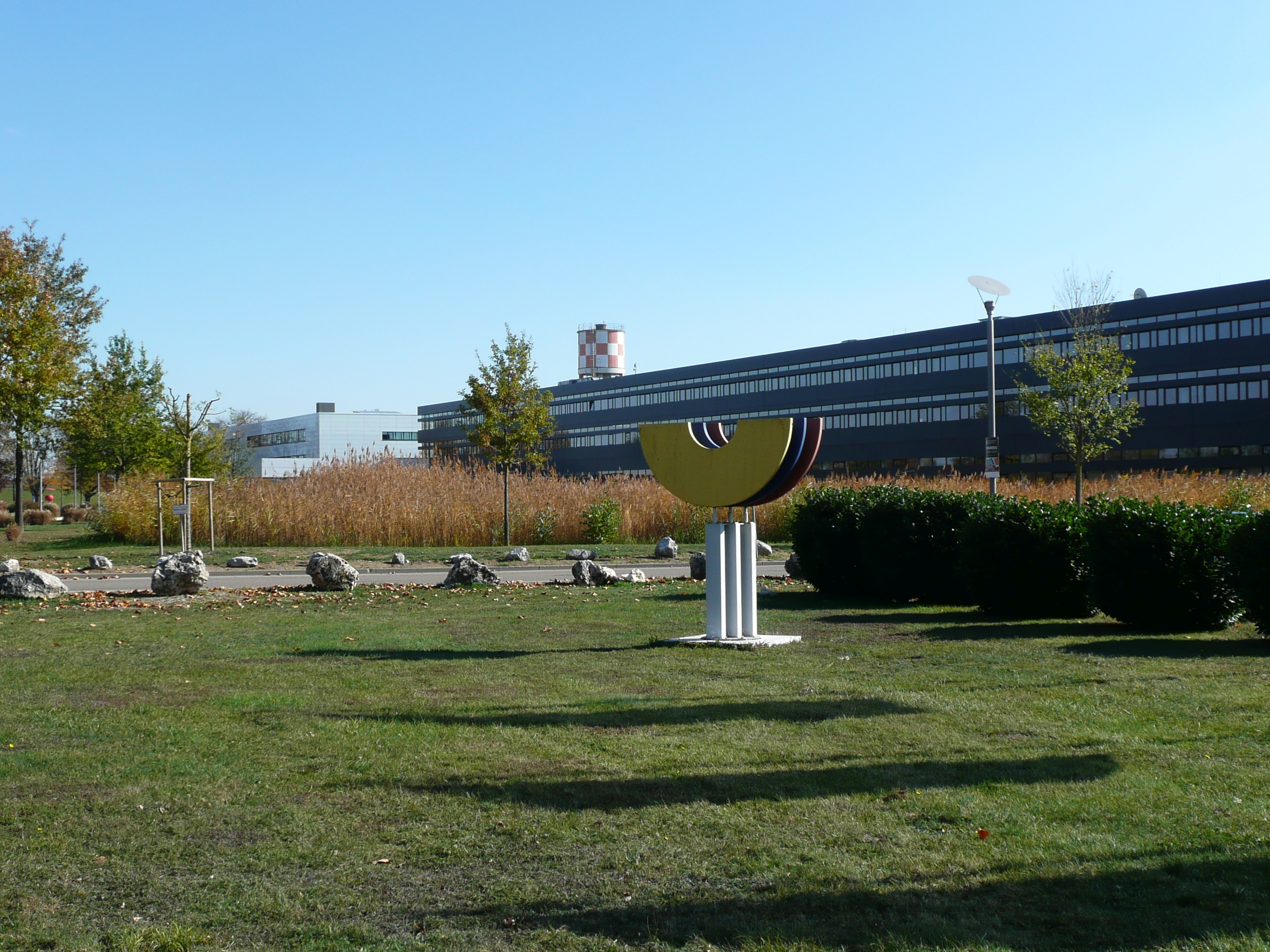 Schilfbewachsener See entlang des Hauptgebäudes